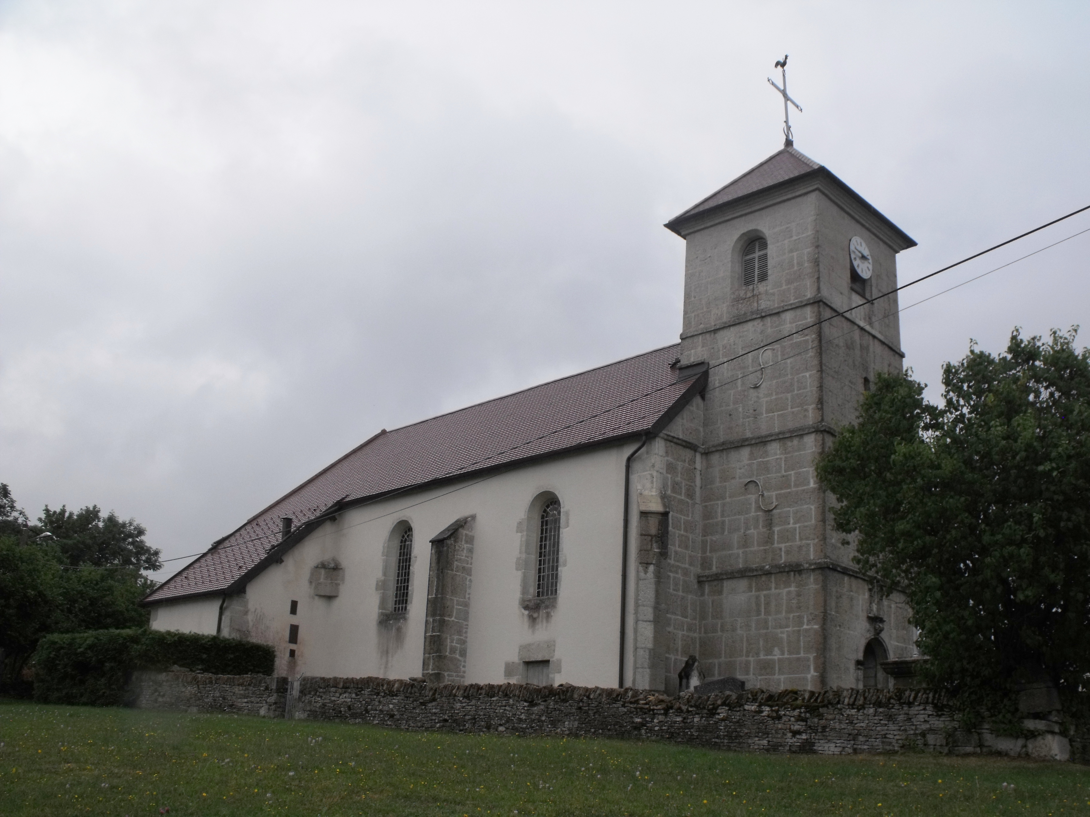 Eglise de Peseux, Doubs, France